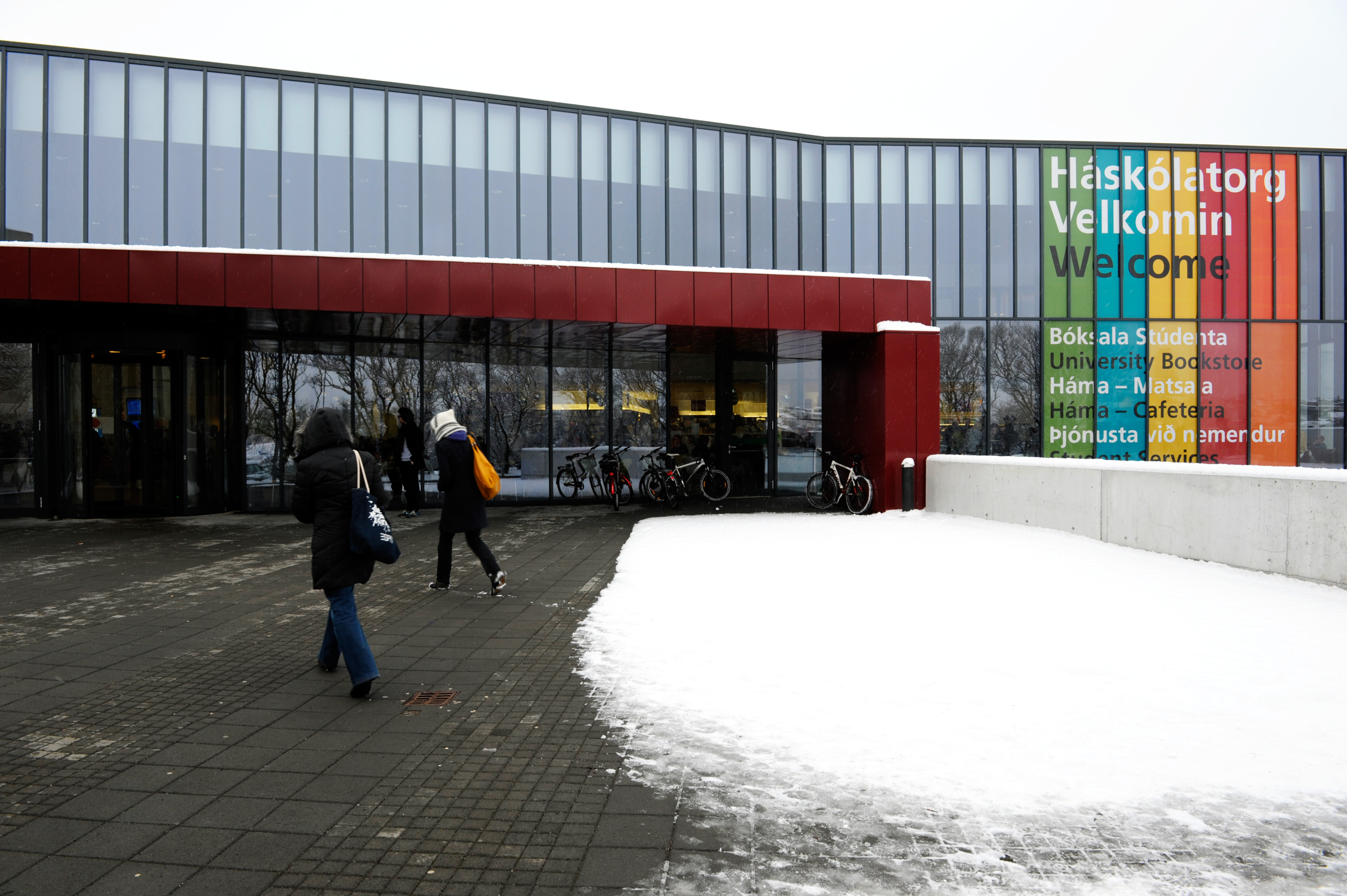 Islands universitet 2009-01-28